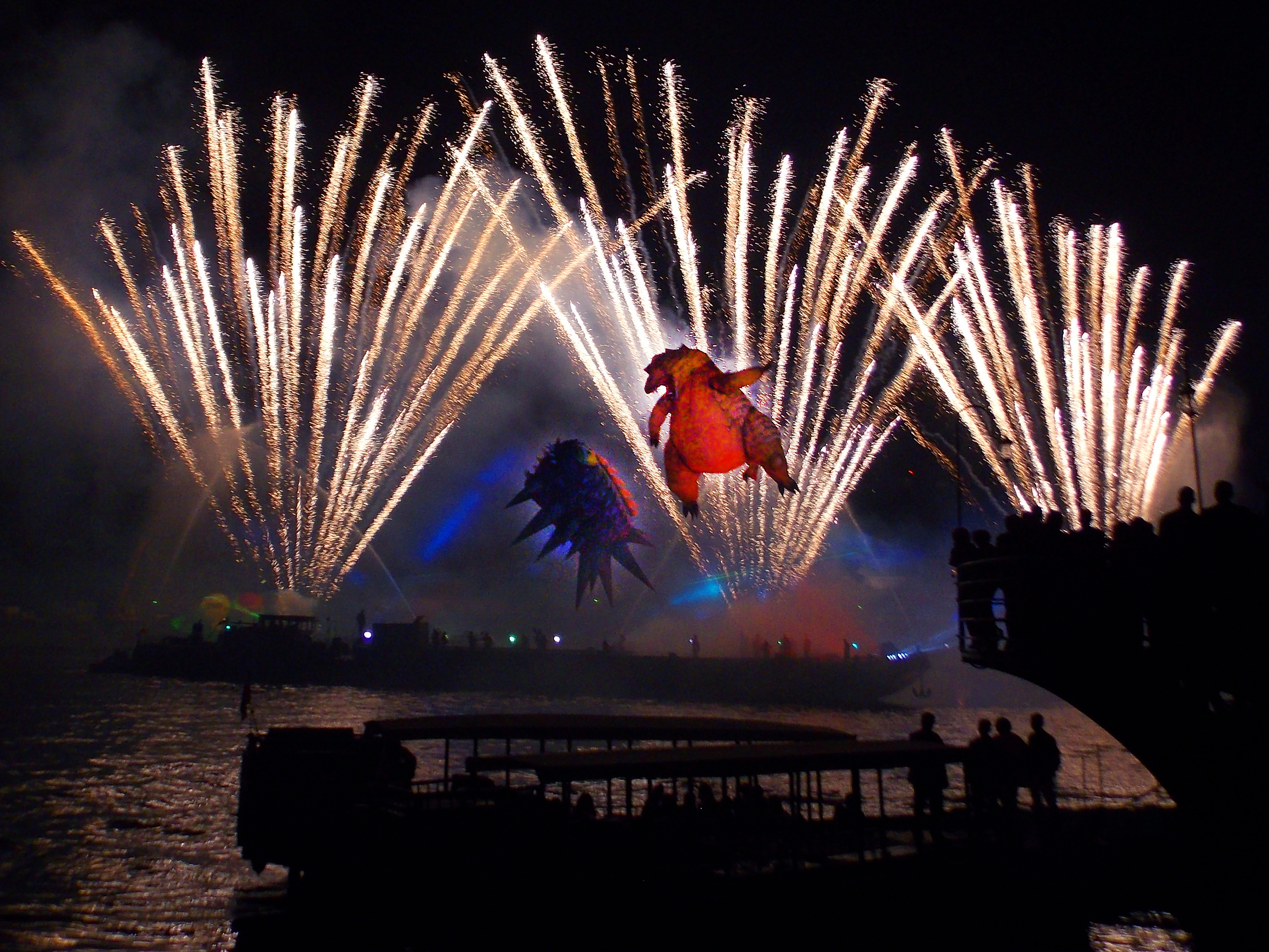 Великий парад драконів у Кракові